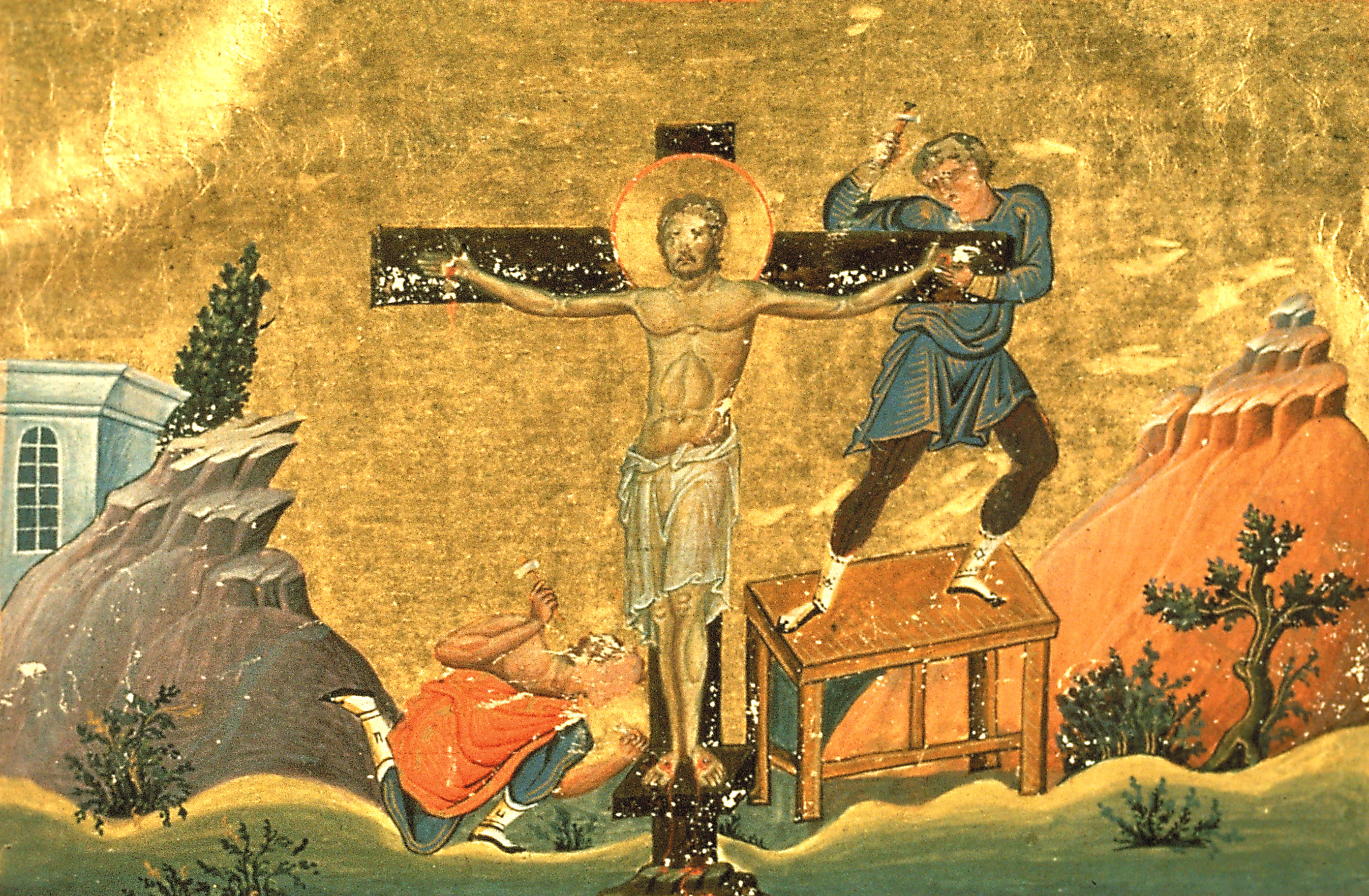 Святитель Нестор Пергийский, Магиддийский, епископ, сщмч.